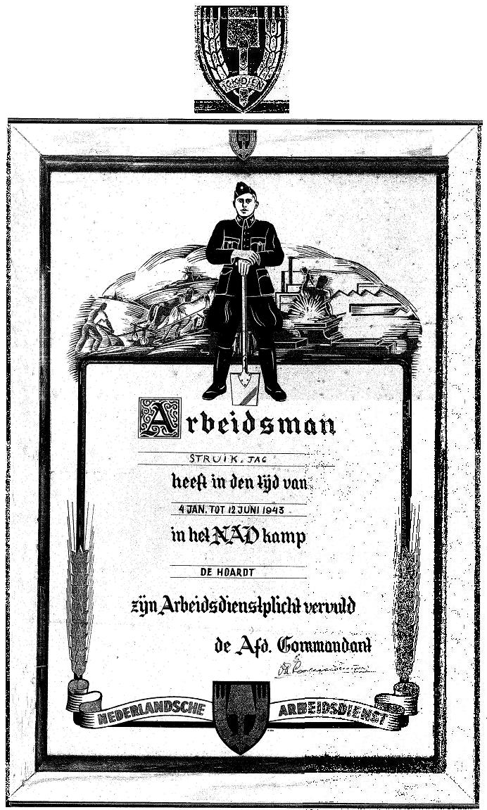 Getuigschrift van vervulling van de arbeidsdienstplicht uit 1943 - Arbeidsman Jac Struik Kamp De Hoardt (Kamp Diever). Geplaatst op verzoek van Dirk Wiggerink, medewerker Herinneringscentrum Kamp Westerbork